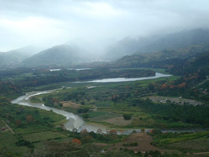 Río Reventazón a su paso por el Valle de Orosi, Cartago, Costa Rica.